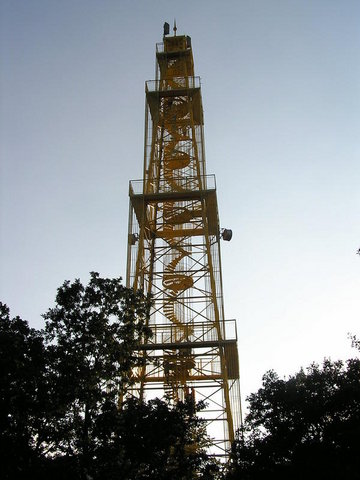 Mátrafüred mellett található Sástó partján álló kilátó, ami egy régi fúrótoronyból lett kialakítva.